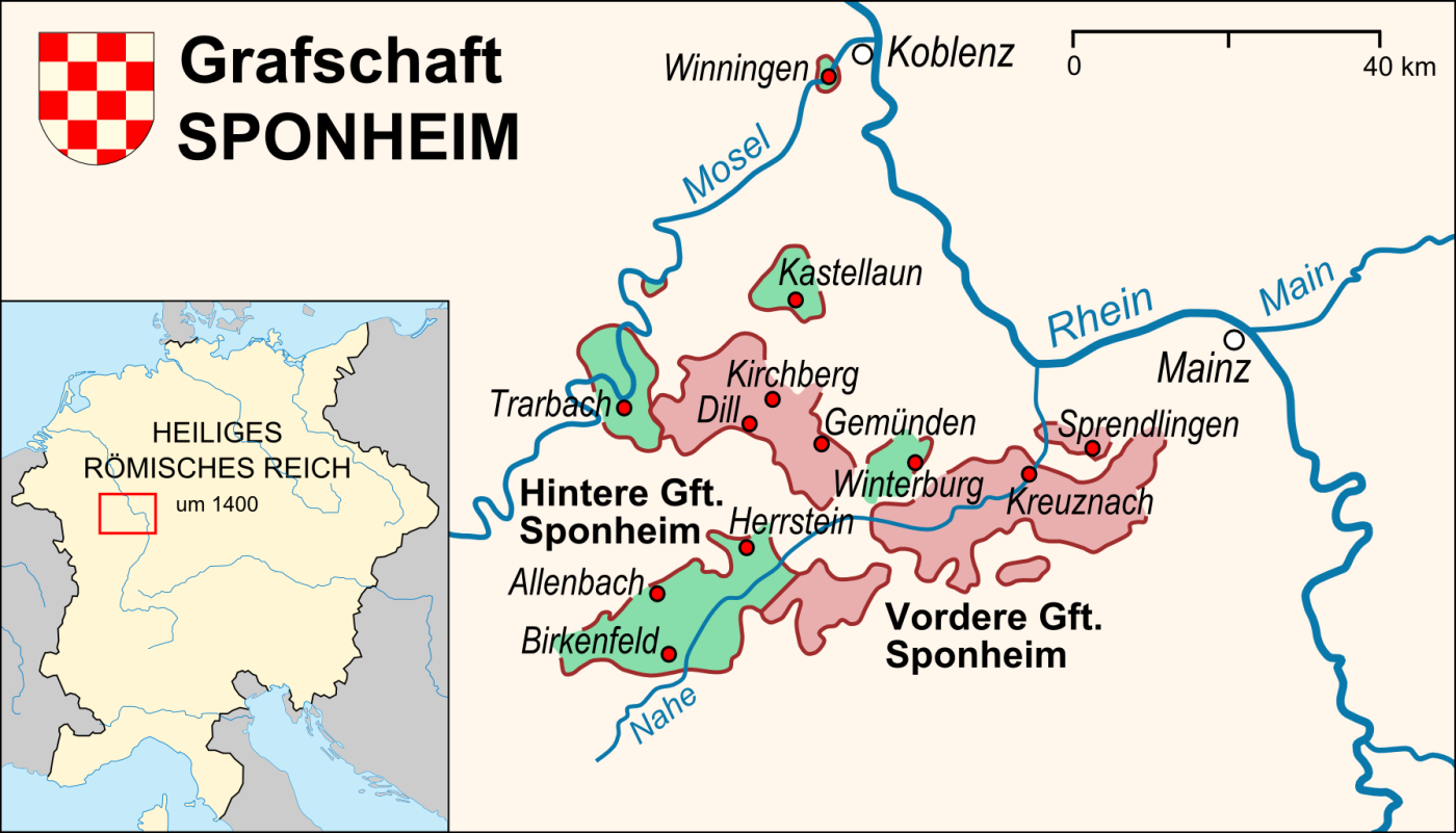 Karte der Grafschaft Sponheim